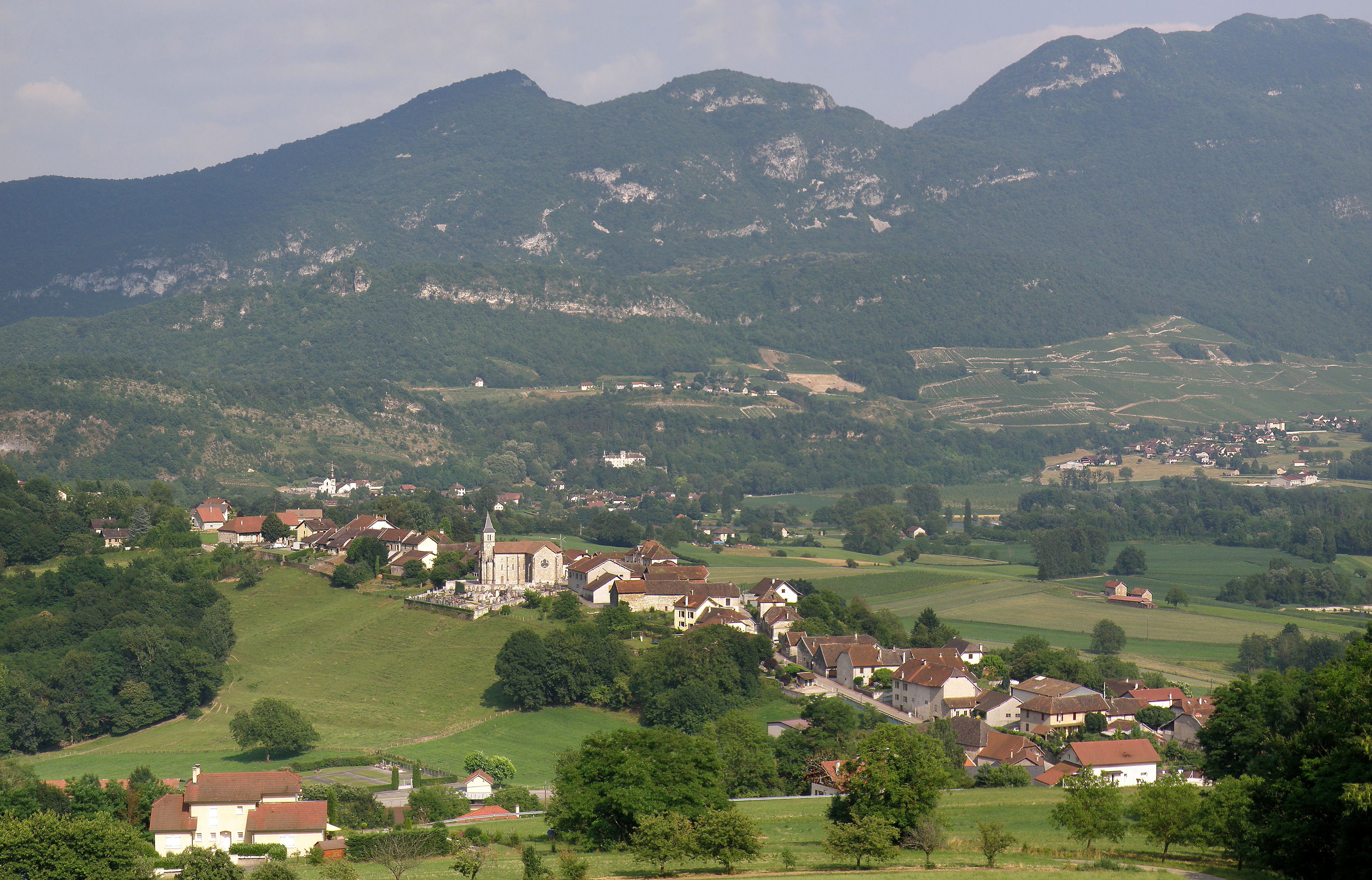 Massignieu-de-Rives, comm. dans le département de l’Ain (région Rhônes-Alpes, France). Coup d’œil vers l’est. À l’arrière-plan, montagne de la Charvaz ; au pied de la montagne, les villages de Lucey (à gauche, avec son château et son église Saint-Étienne) et de Jongieux (à droite, avec le château de La Mare).